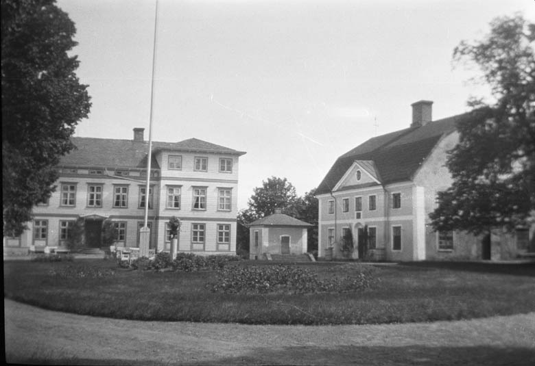 Motiv: Björnö Kategori: HerrgårdBjörnö